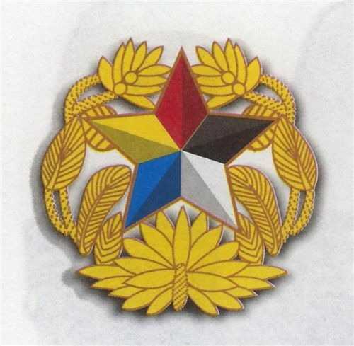 中华民国北洋军帽徽